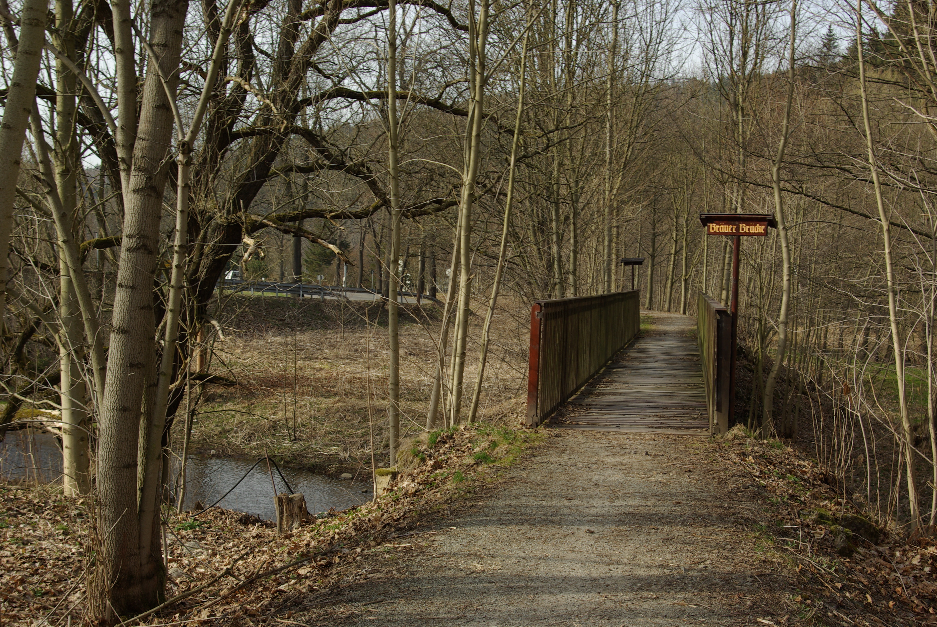 Bräuerbrücke der ehemaligen Schmalspurbahn Wolkenstein–Jöhstadt (1892-1986) über die Preßnitz, heute Rad- und Wanderweg.